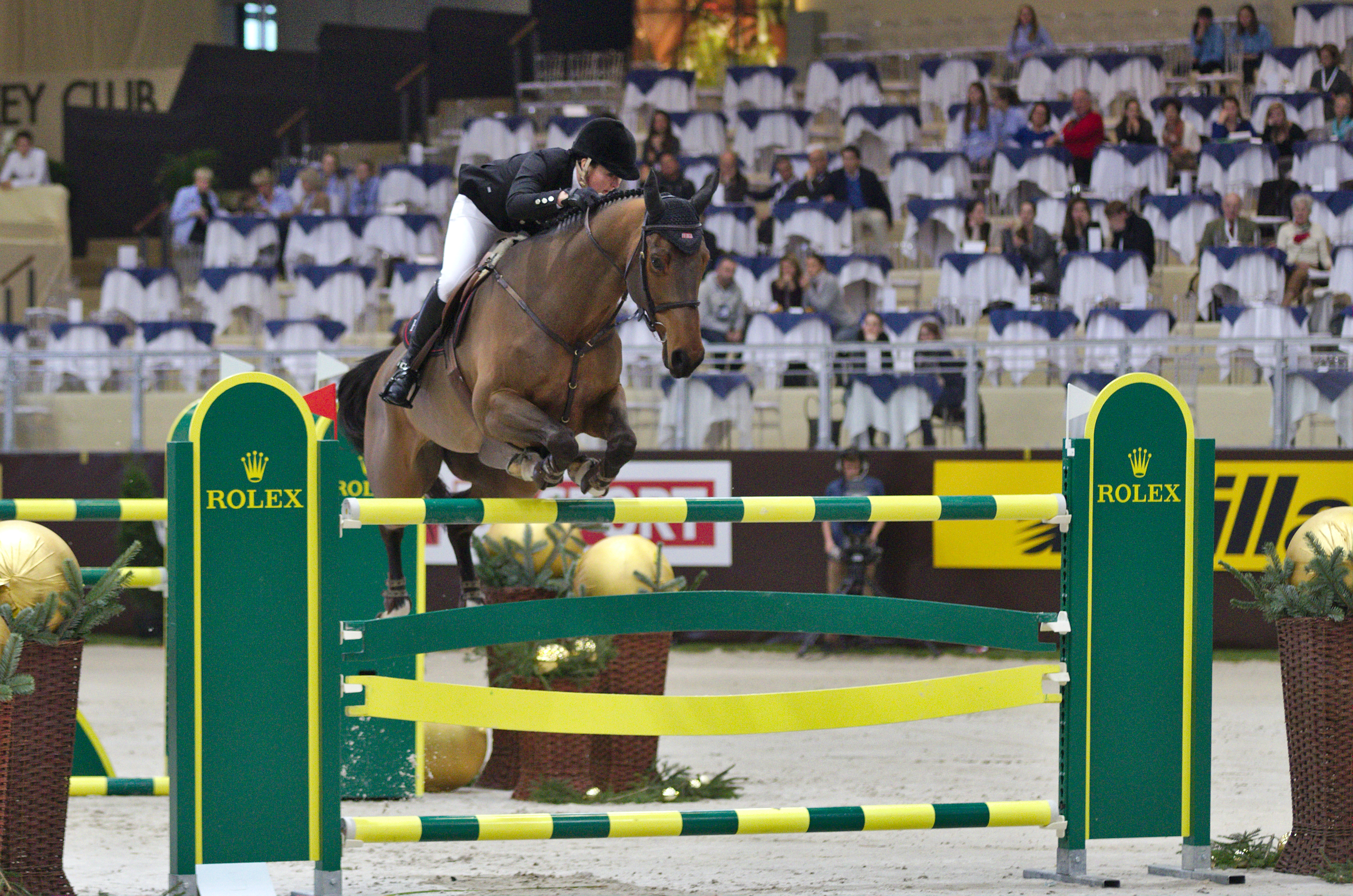 CHI Genève 2013 - 20131214 - Faye Schoch et Nouvelle Europe Z